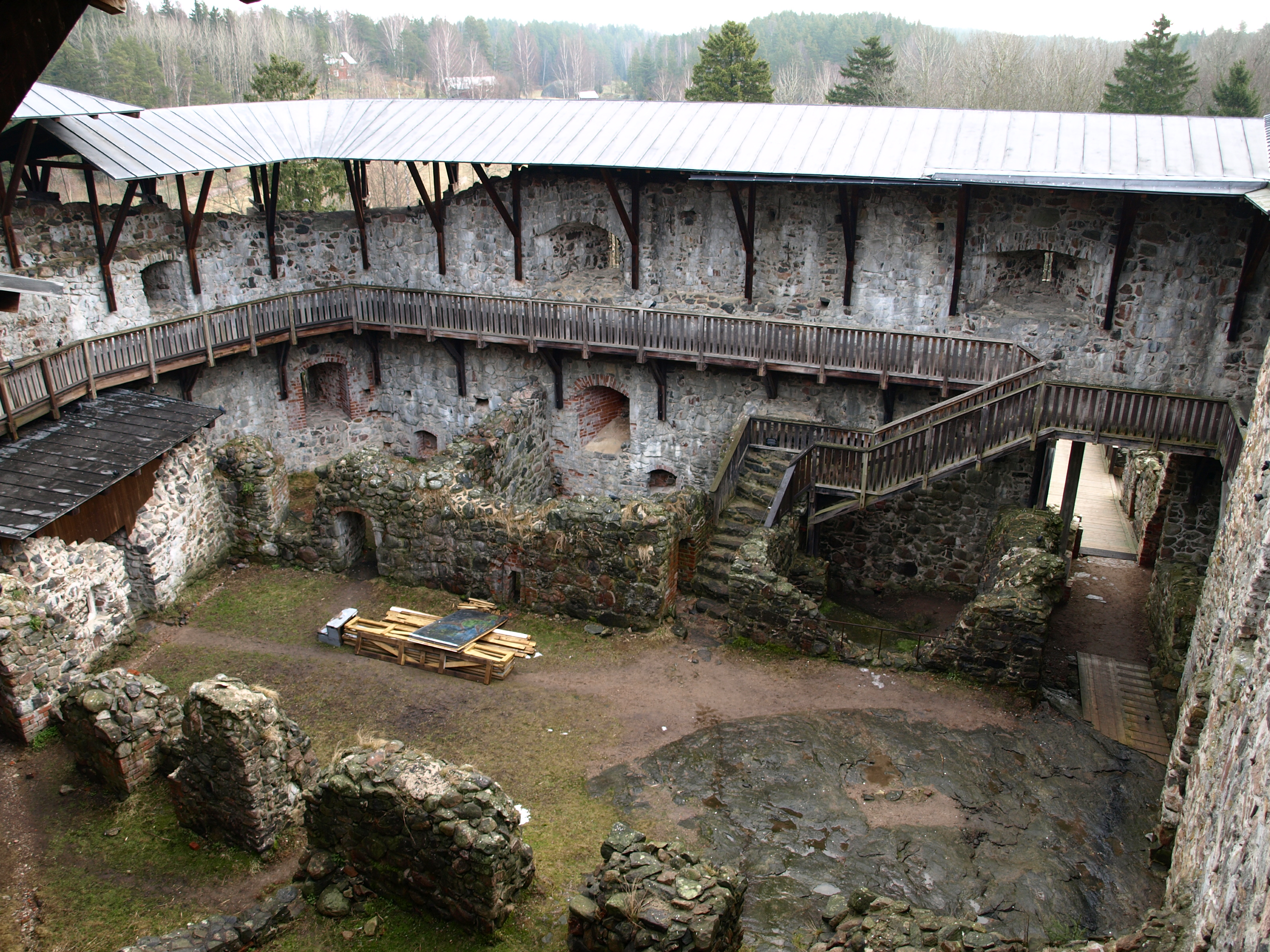 Die Burgruine Raseborg bei Snappertuna (Südfinnland)